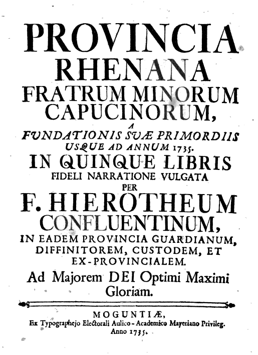 Hierotheus Confluentinus, Kapuzinerchronist, Buchtitelblatt 1734